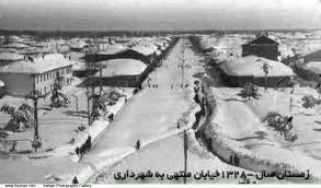 (برف رشت سال هزار و سیصد و بیست و هشت (خیابان های منتهی به شهر داری